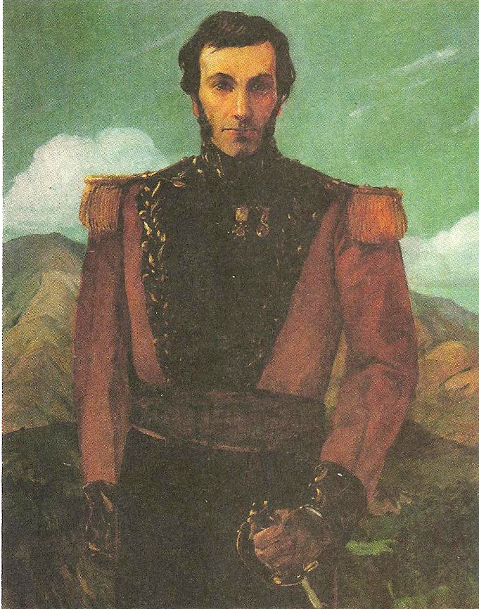 Óleo sobre tela por Tito Salas de José María Carreño